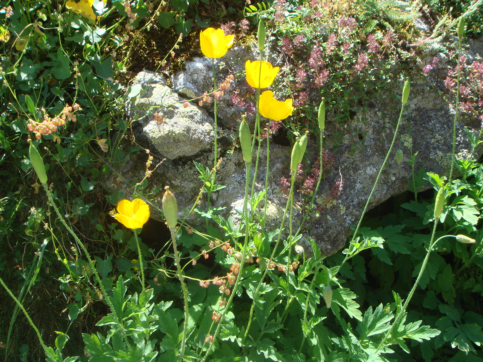 Meconopsis cambrica, Valle de Barrosa, Pirineos, (Huesca), España.